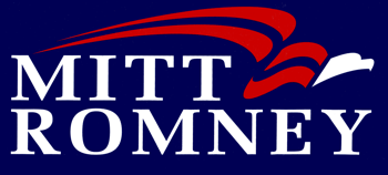 Logo Mitt Romneys Kampagne für den Präsidentschaftswahlkampf 2008